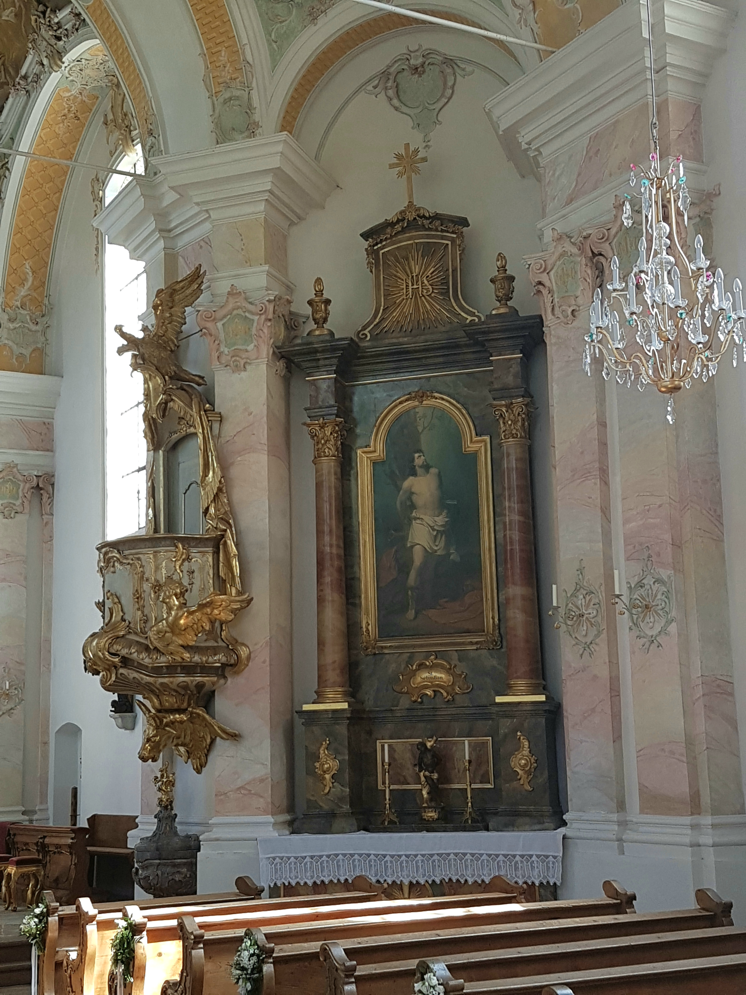 Starnberg, alte Pfarrkirche St. Josef, rechter Seitenaltar und Kanzel.